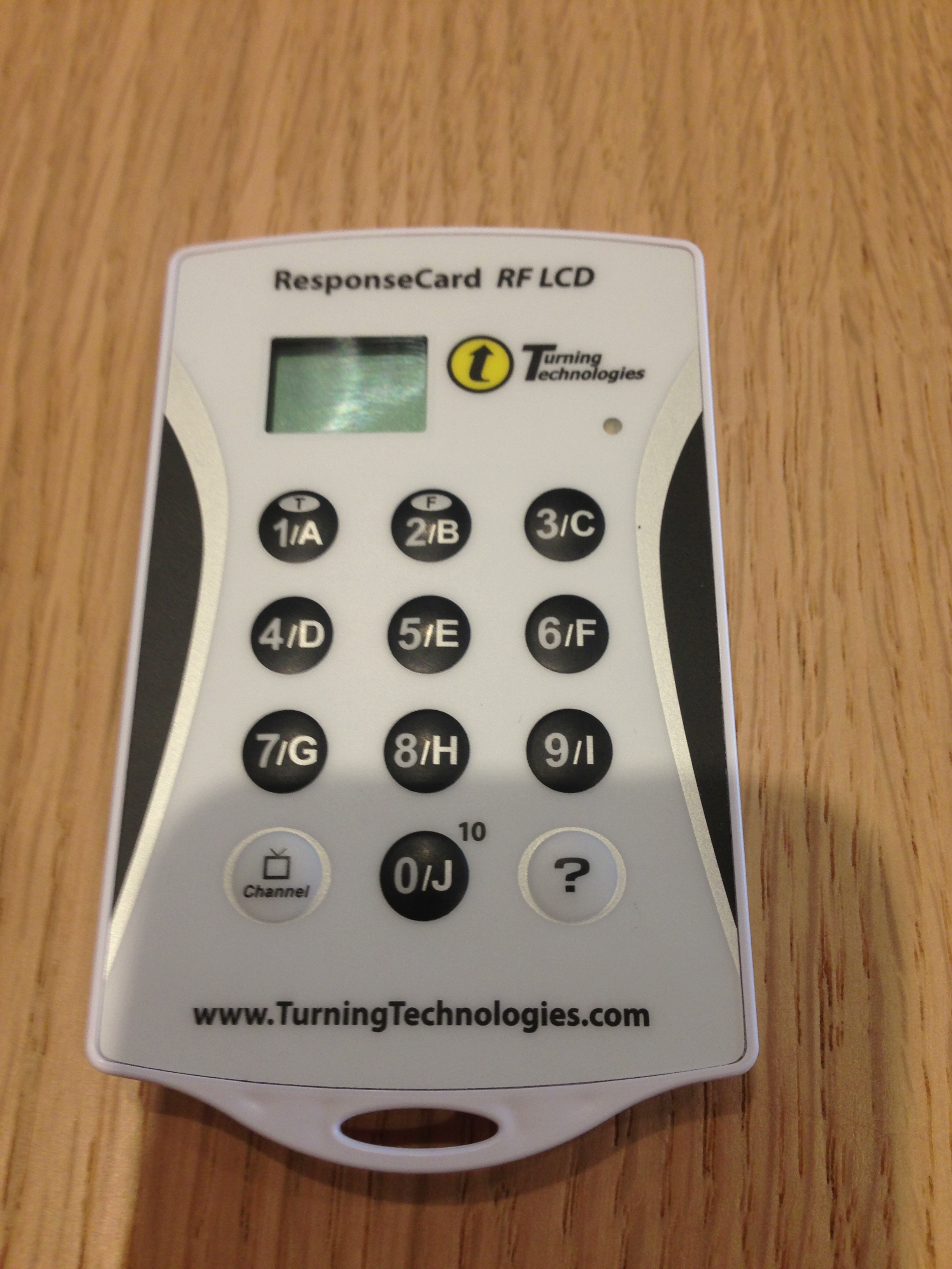 Beispielfoto für gängige Clicker